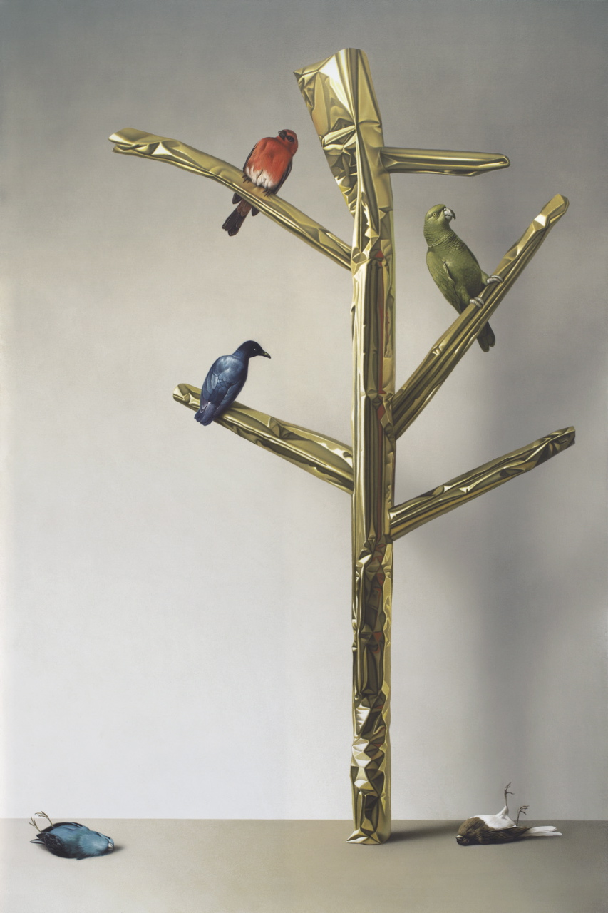 Eckart Hahn: Golden Tree, 180x120cm